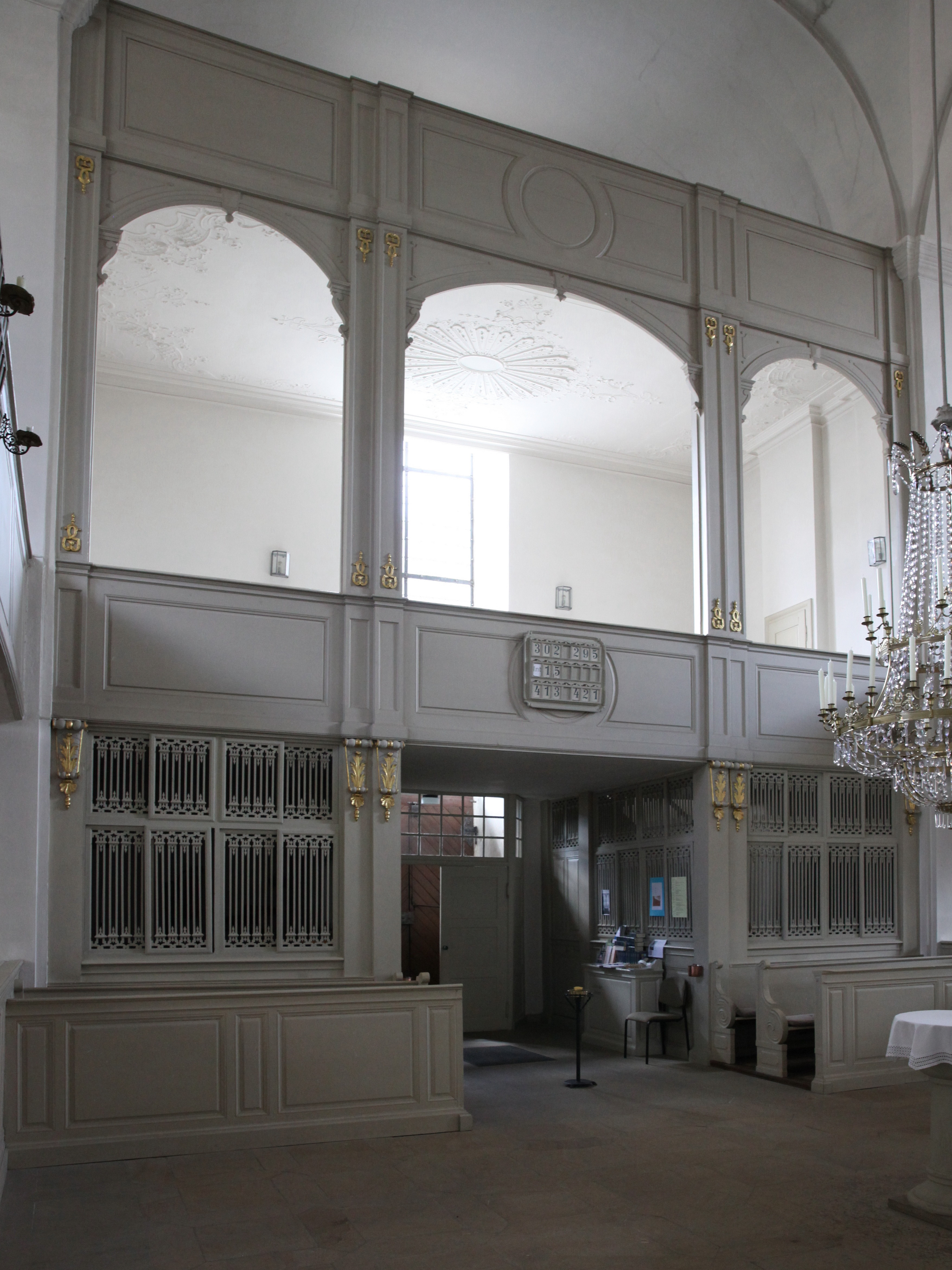 Westempore, Schlosskirche in Lahm im Itzgrund